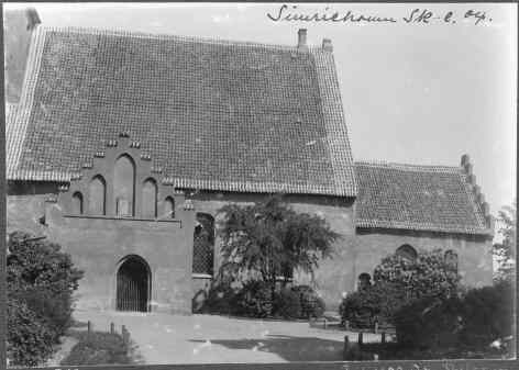 Sankt Nicolai kyrka, Kyrkan från söder. Fotograferad innan putsen togs bort.